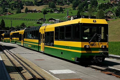 Wengernalpbahn in Grindelwald Grund